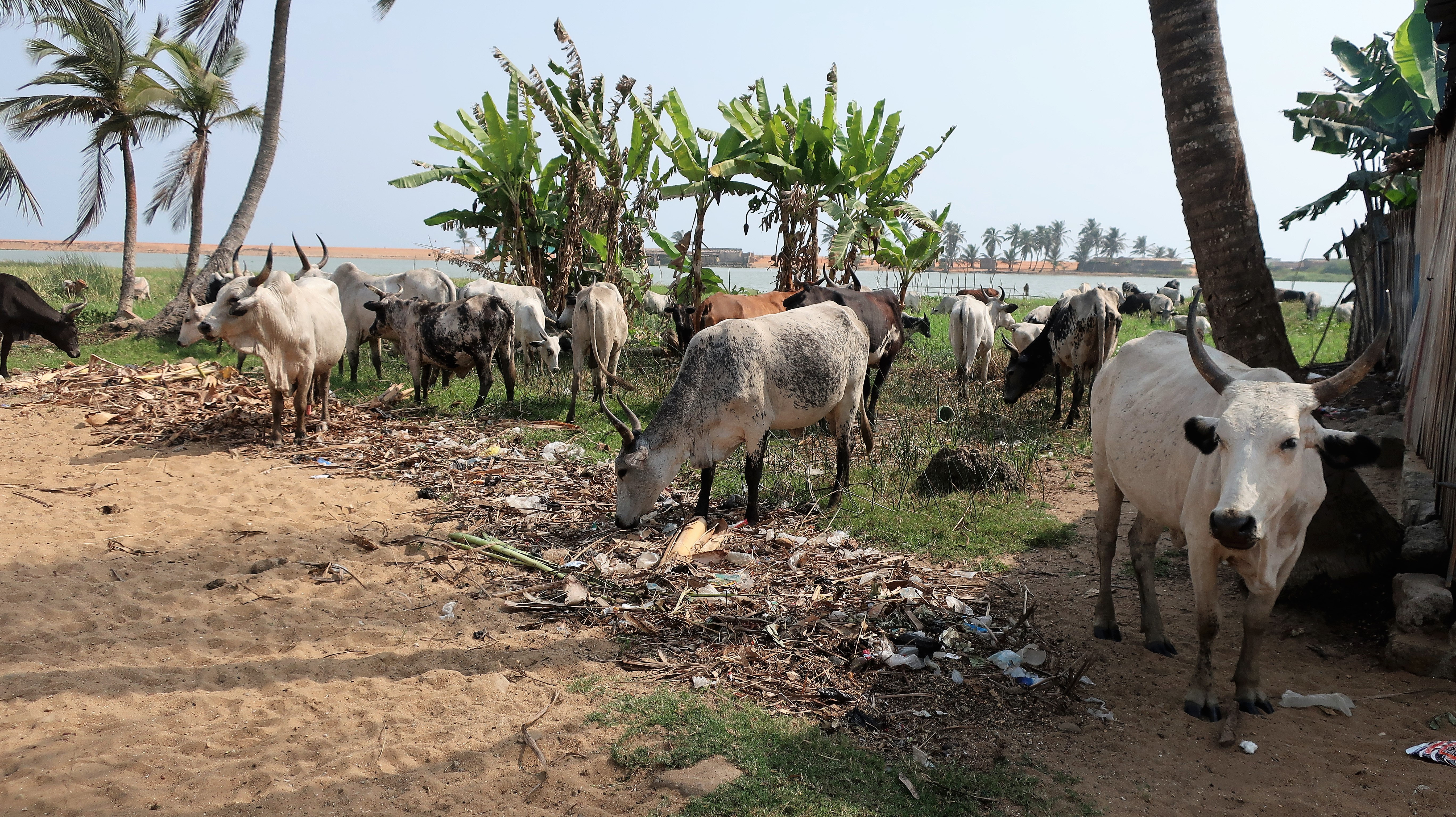 Cows at the strand, houses on the other side of the lagoon near old Grand-Popo, Gbecon.